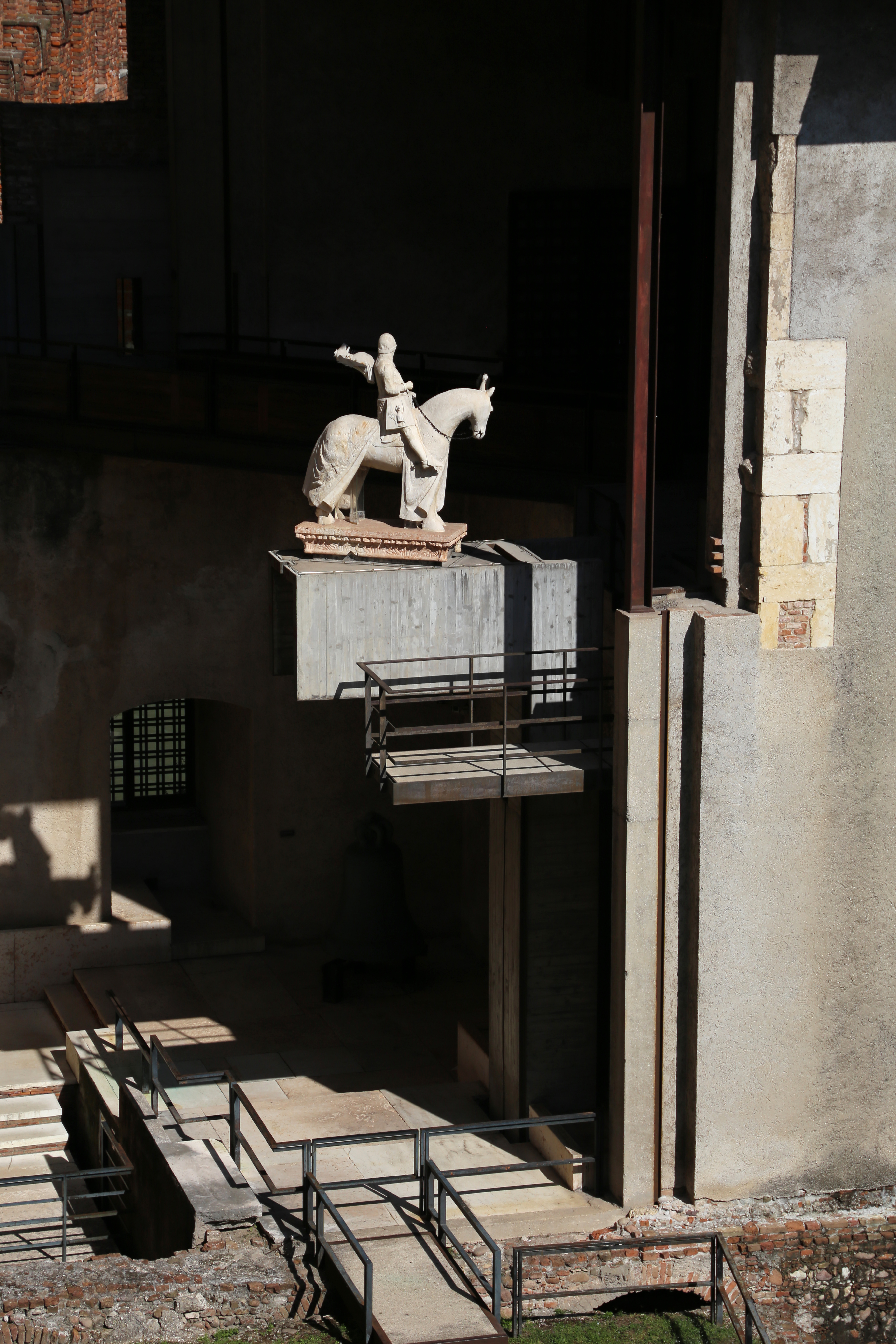 Museo di Castelvecchio This is a photo of a monument which is part of cultural heritage of Italy.